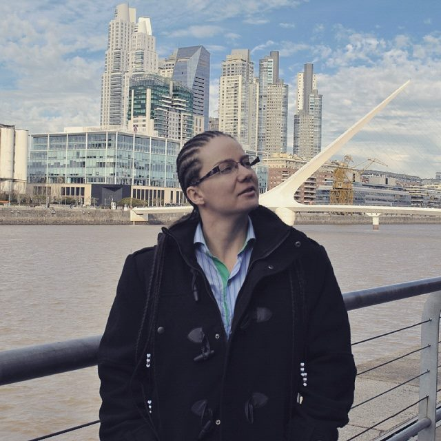 Kitty Sanders